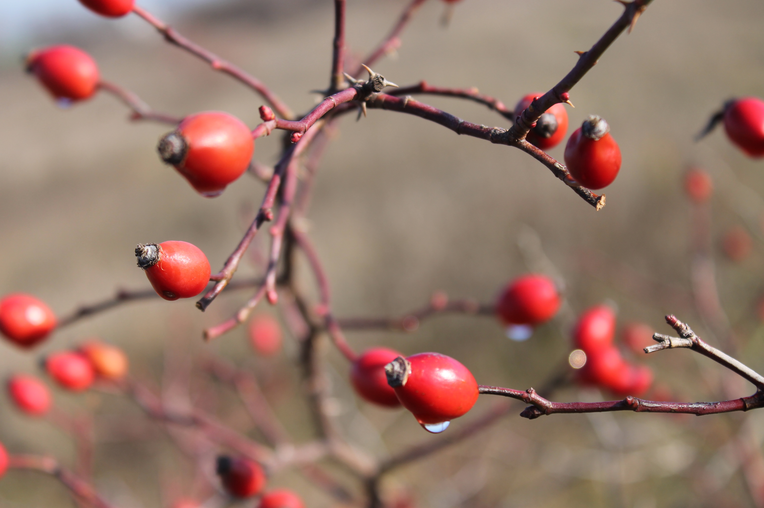 «Аджамський», Кіровоградський р-н, с. Аджамка